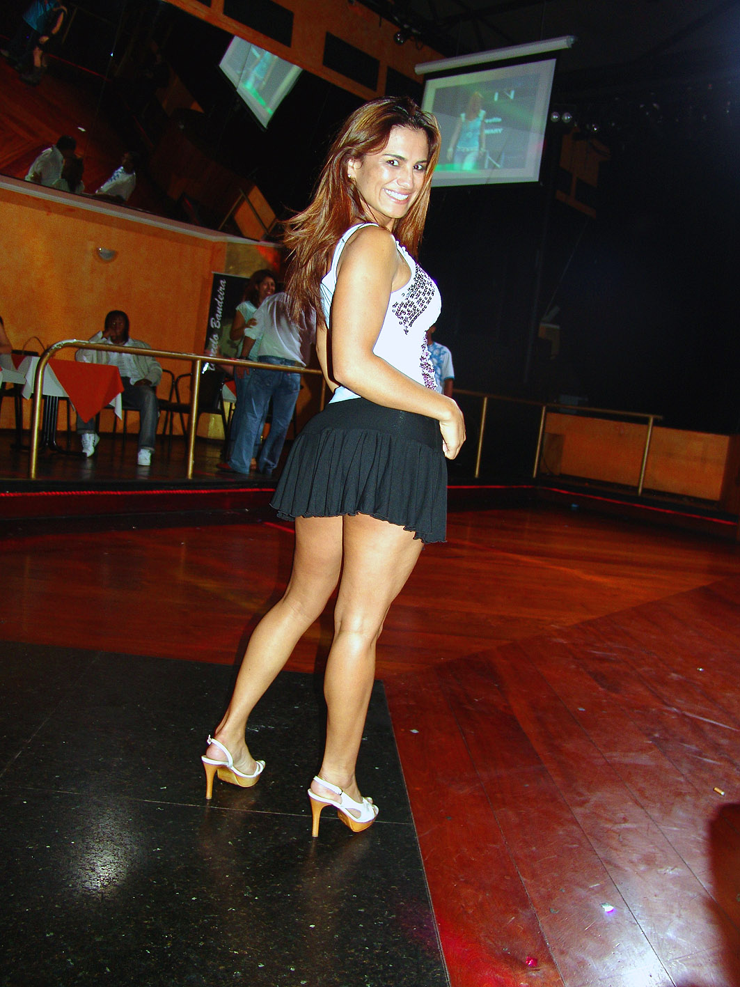 Márcia Imperator